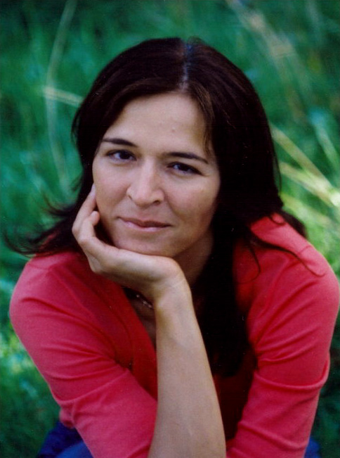 Eva Günschmann